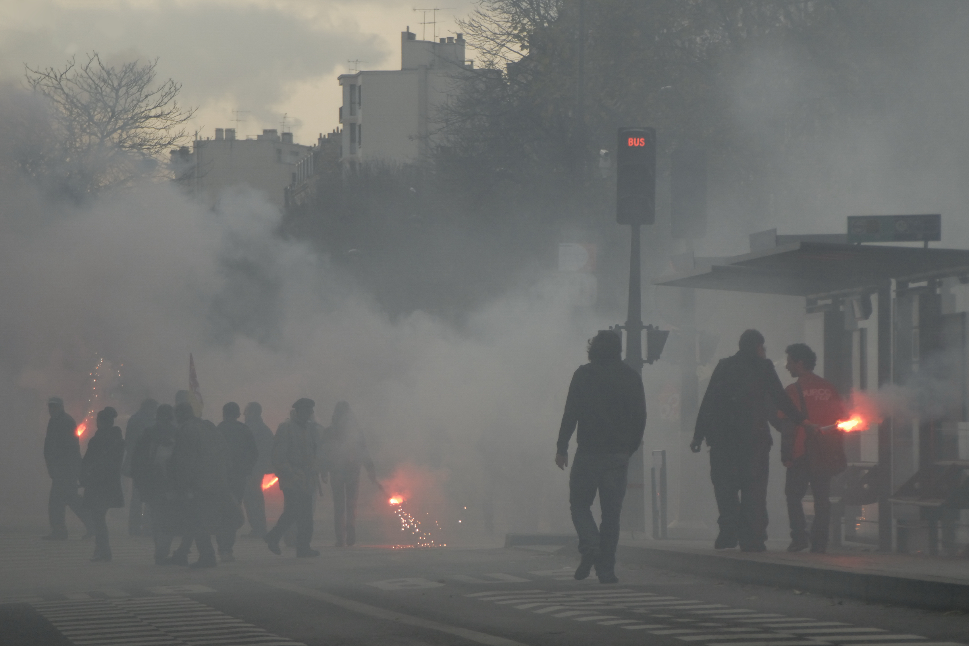 Fumigènes dans une manifestation parisienne